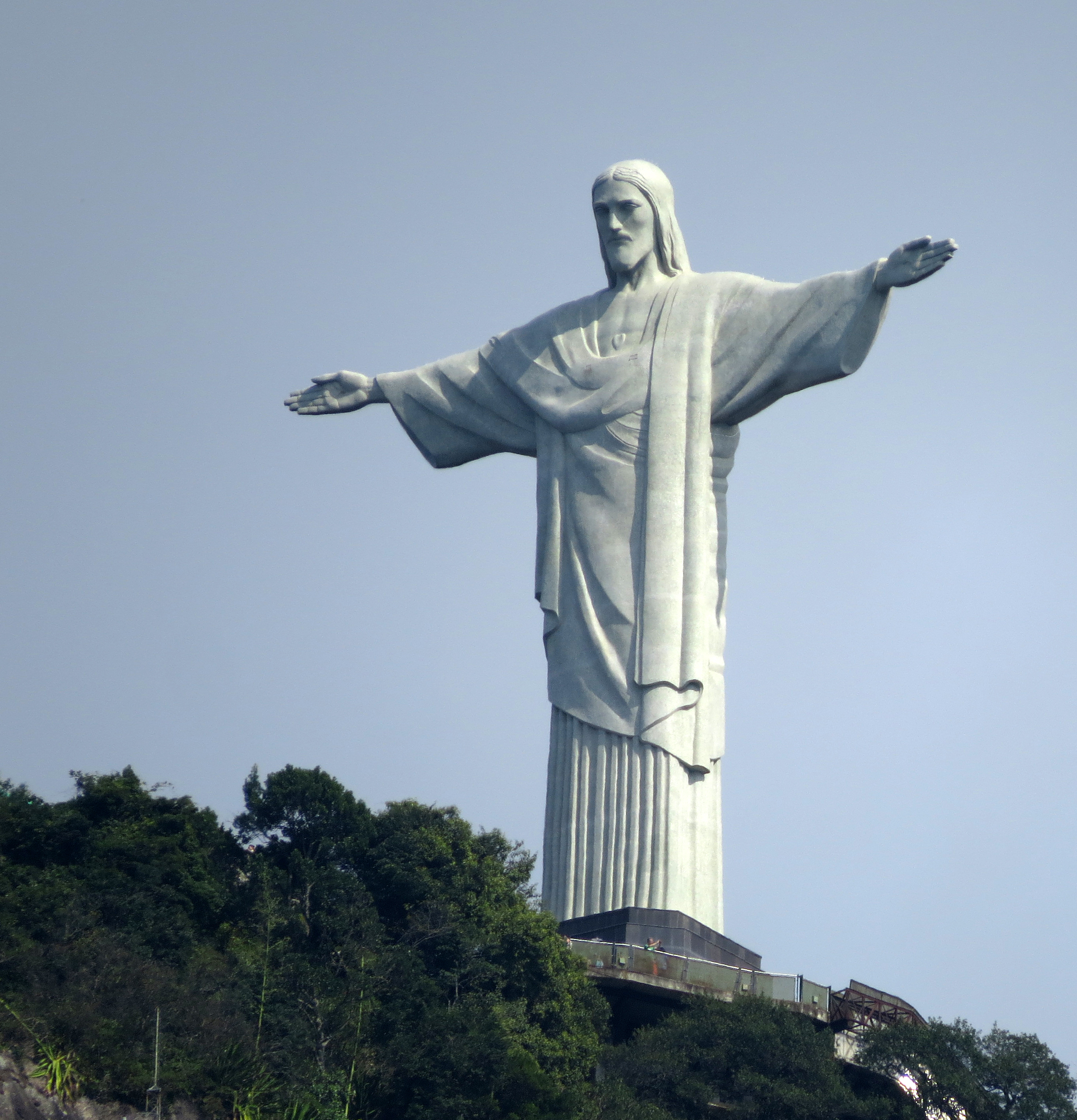 Descrição_para_sua_foto